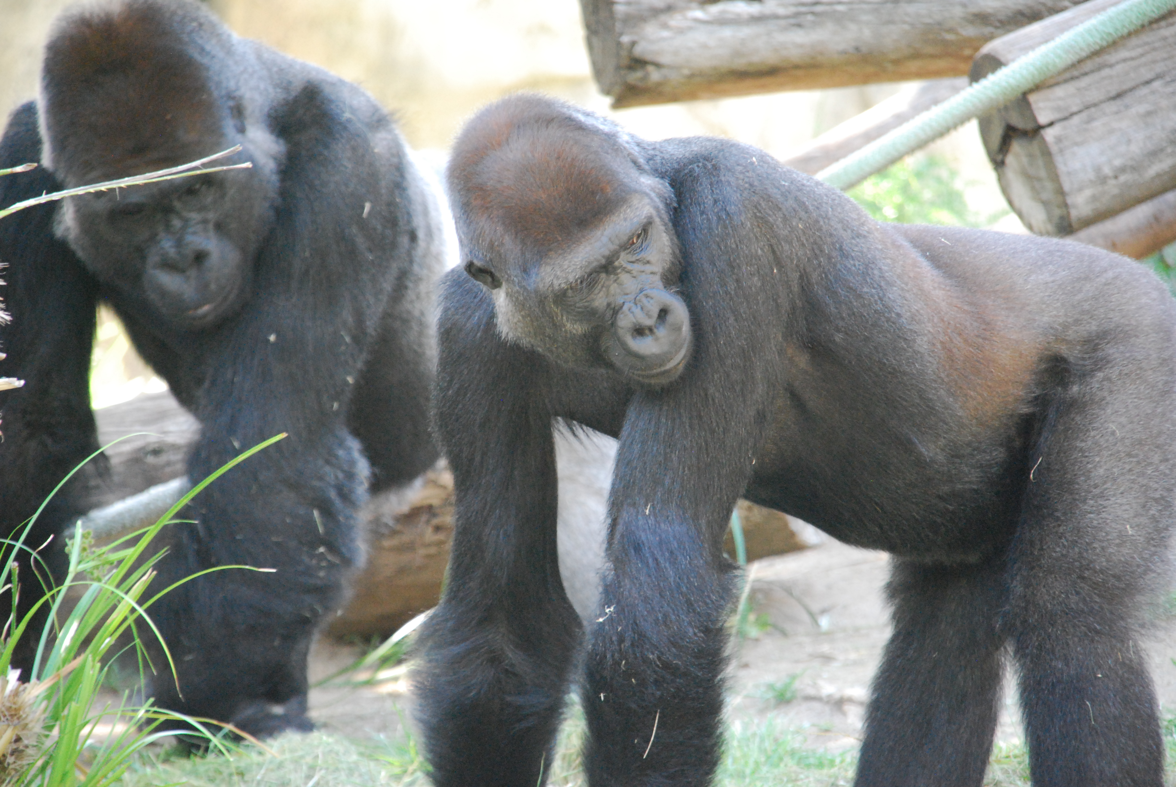 San Diego Zoo